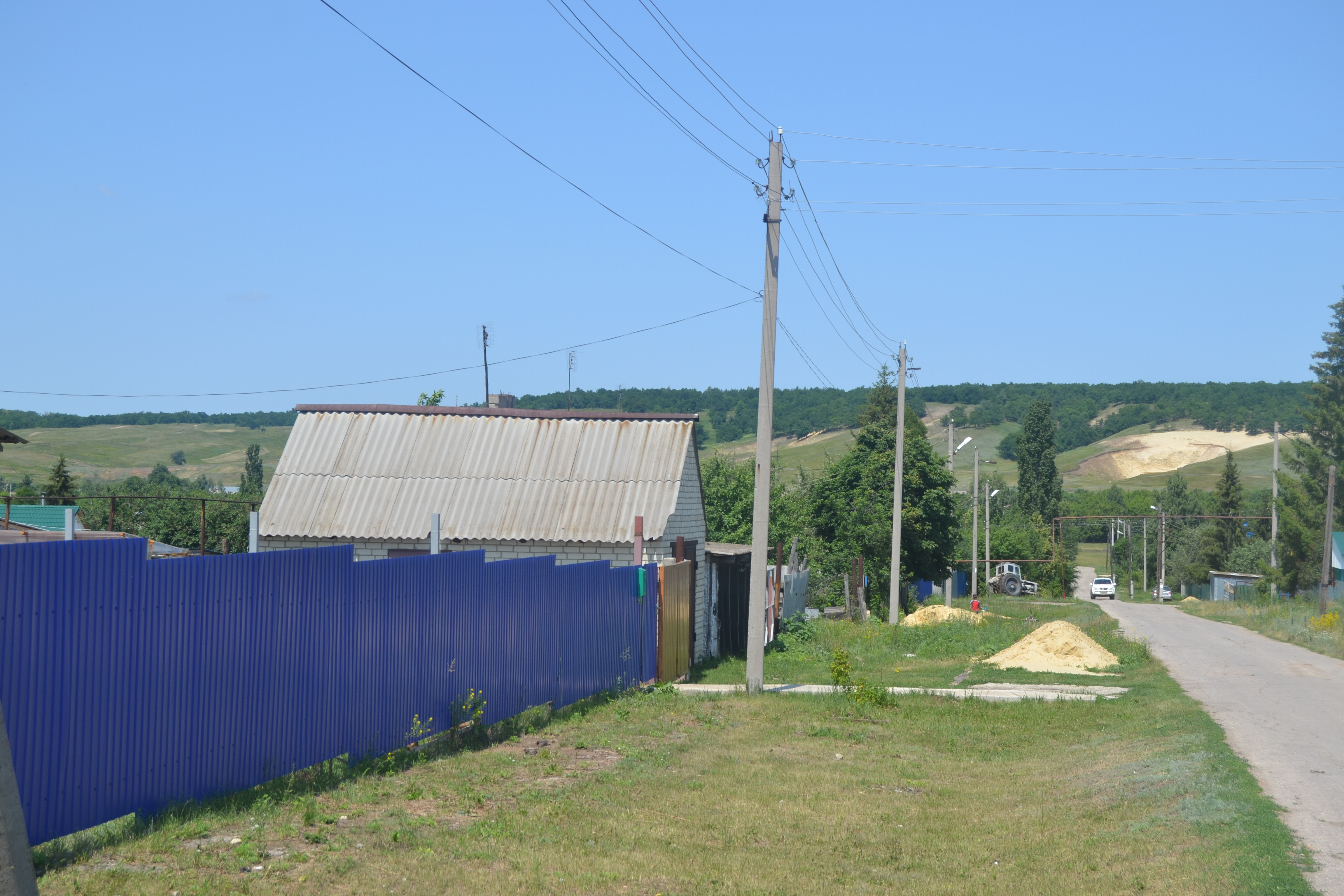 Изображение населённого пункта. Переулок (Поповка, Саратовский район)